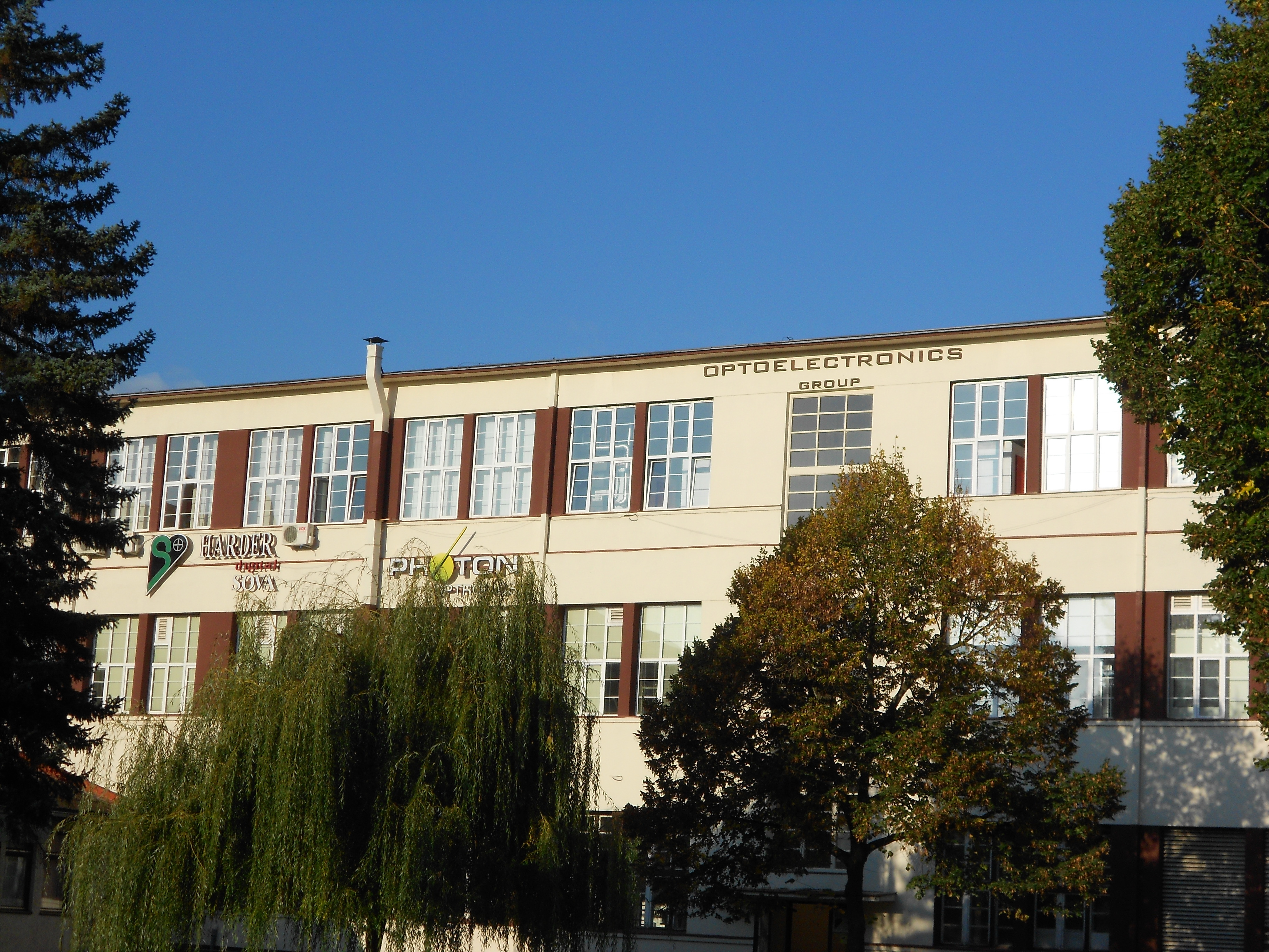 Драган Цветковић Ниш Део зграде и улаз Хардер дигитал Сова у Нишу